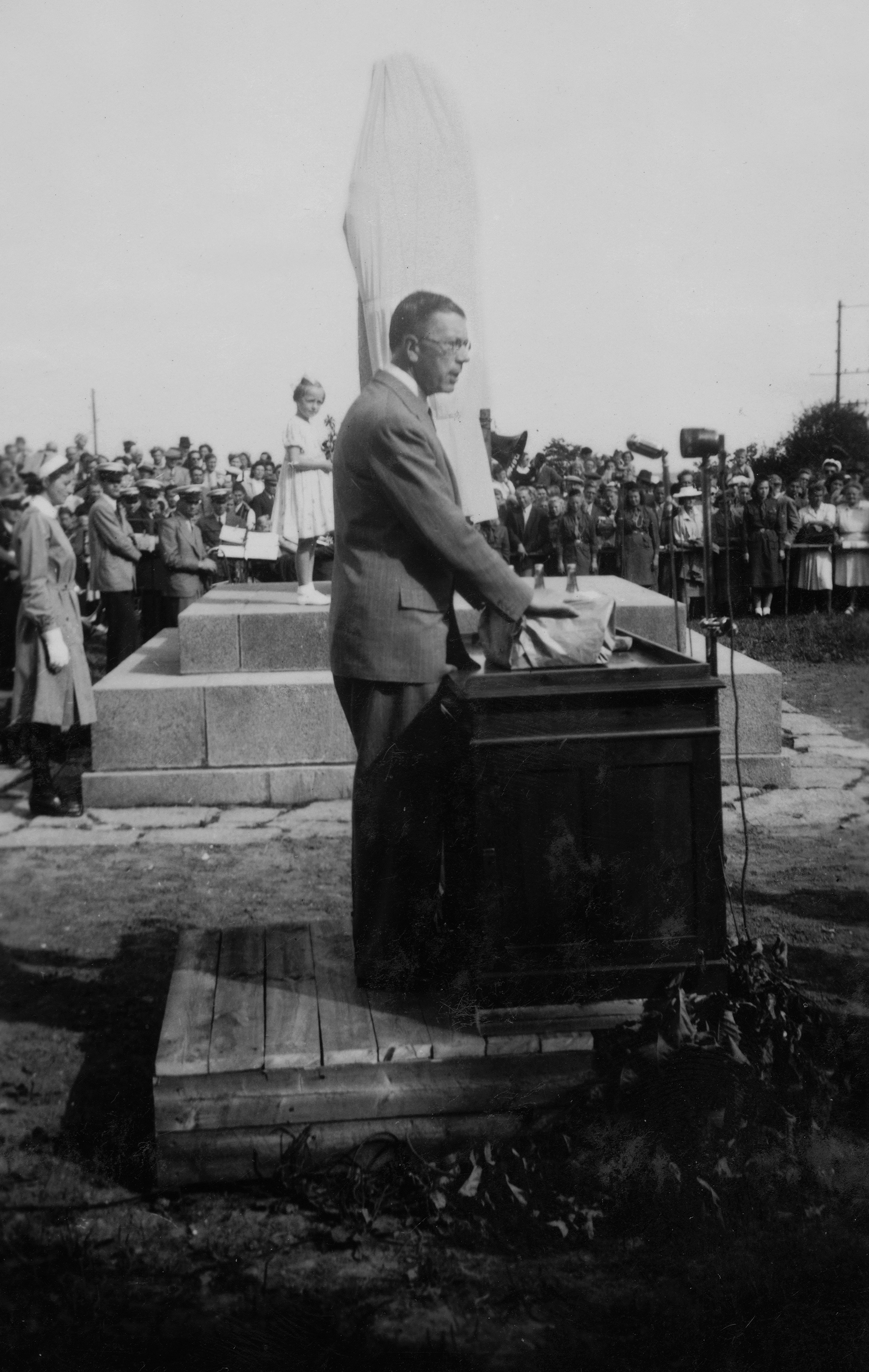 Invigningen av Tycho Brahestatyn på Ven söndagen 25 aug 1946.